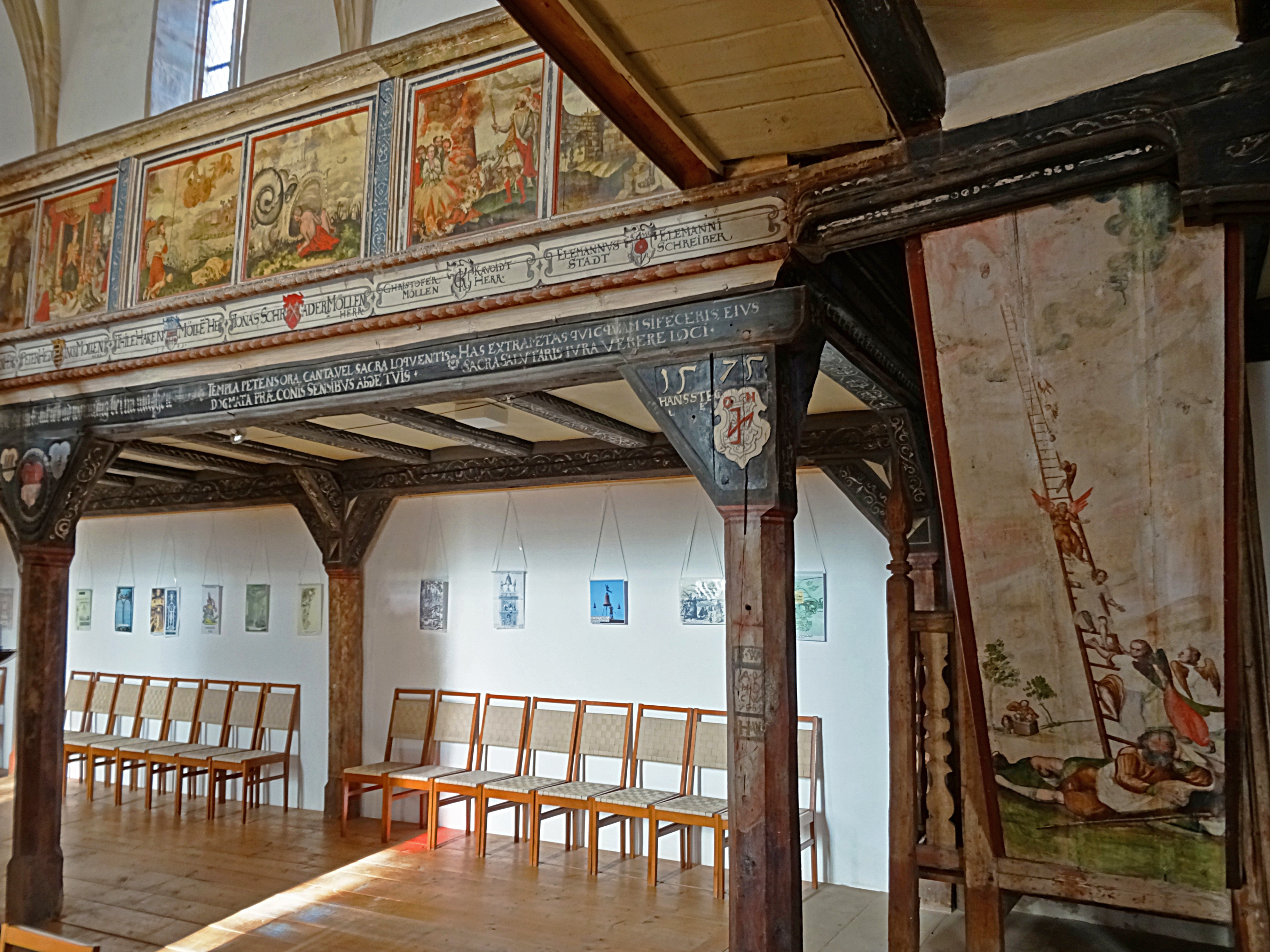 Himmelsleiter am ehemaligen Zugang zur Gildenprieche in St. Stephani (Osterwieck)